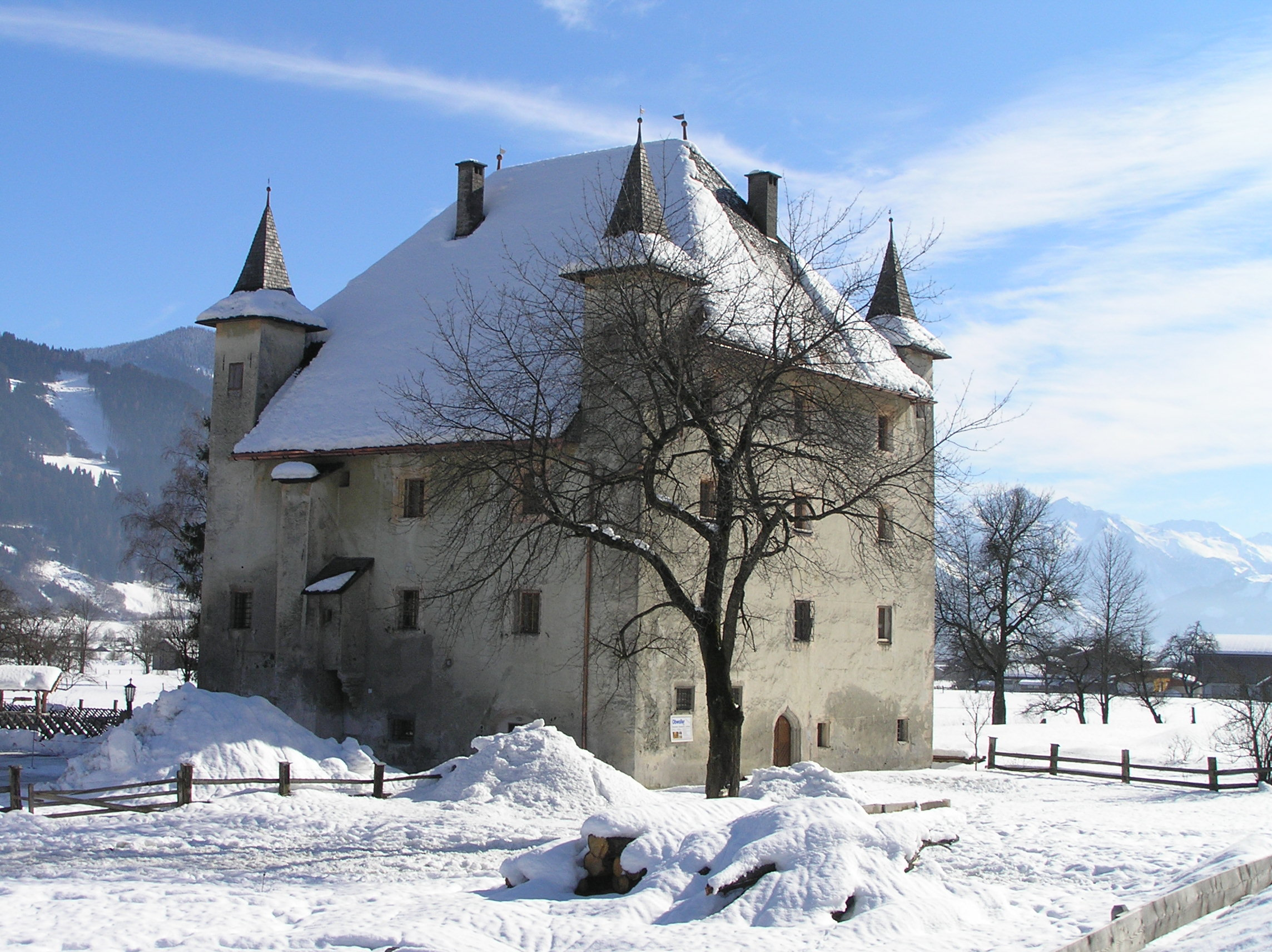 Schloss Saalhof, Maishofen